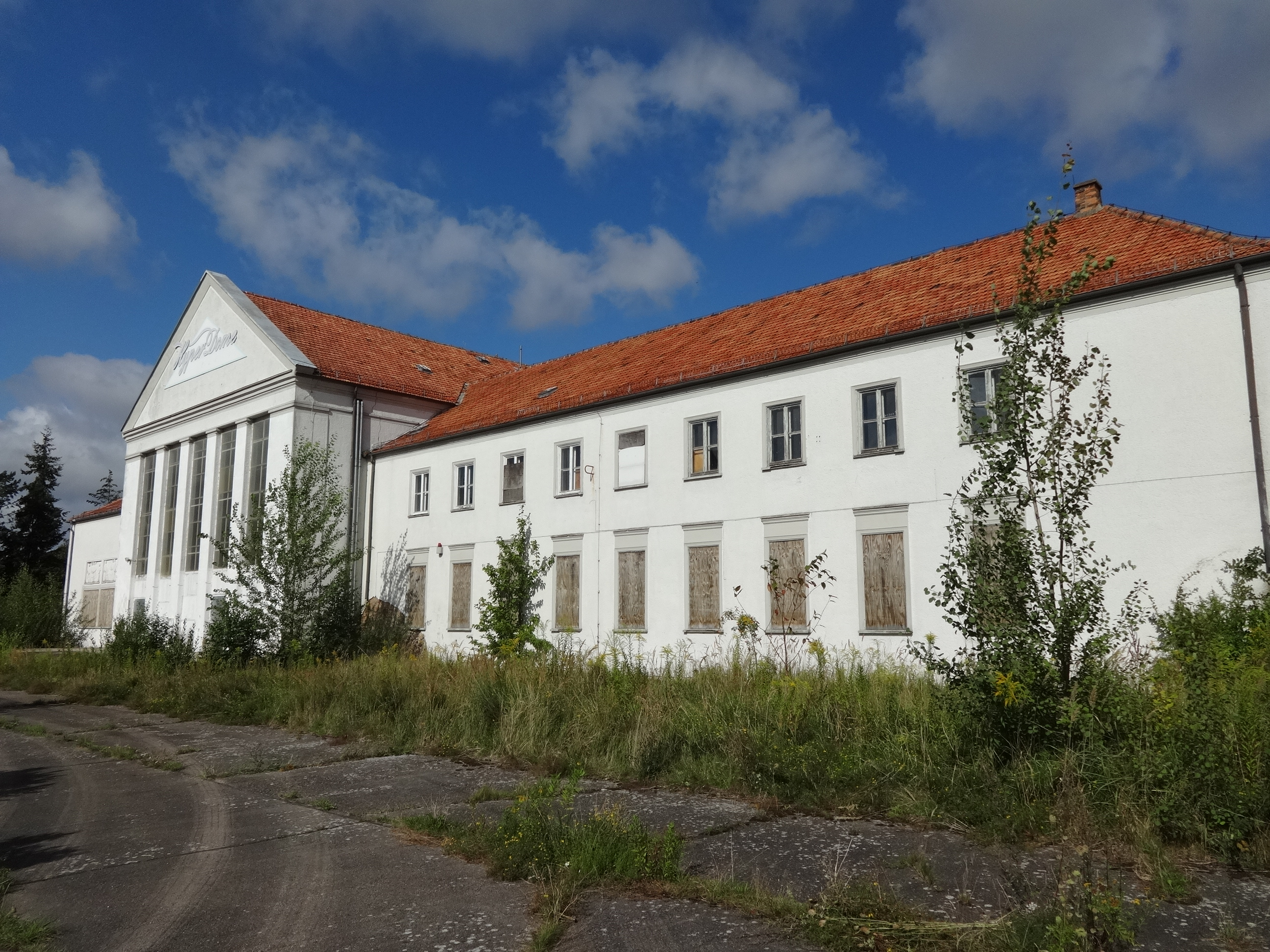 Das Kreiskulturhaus in Murchin entstand in den Jahren 1952 bis 1954 von Gräning und Goltzow, nachdem die Maschinen-Traktoren-Station des Kreises 1950 und 1951 die Wanderfahne des Ministerrates der DDR in die Region holten. Das Gebäude im Stil des Neoklassizismus wurde ab 1964 als Kreiskulturhaus genutzt. An der linken Front befindet sich ein Relief von Bullert mit dem Titel „Die Arbeit der Landwirtschaft in den vier Jahreszeiten“. Murchin gehört im Jahr 2014 zum Landkreis Vorpommern-Greifswald, Mecklenburg-Vorpommern